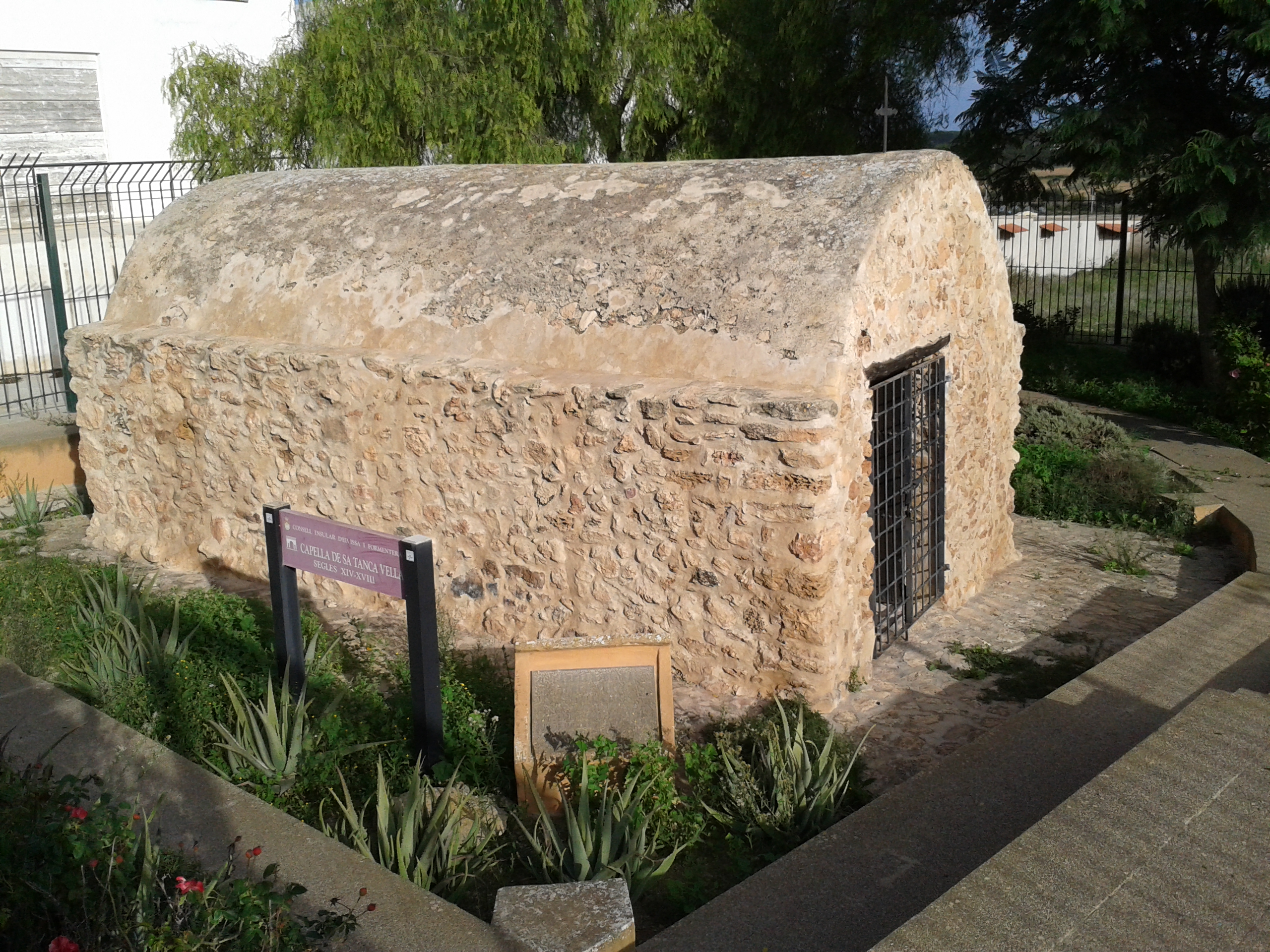 Vista lateral de Sa Capella de Sa Tanca Vella